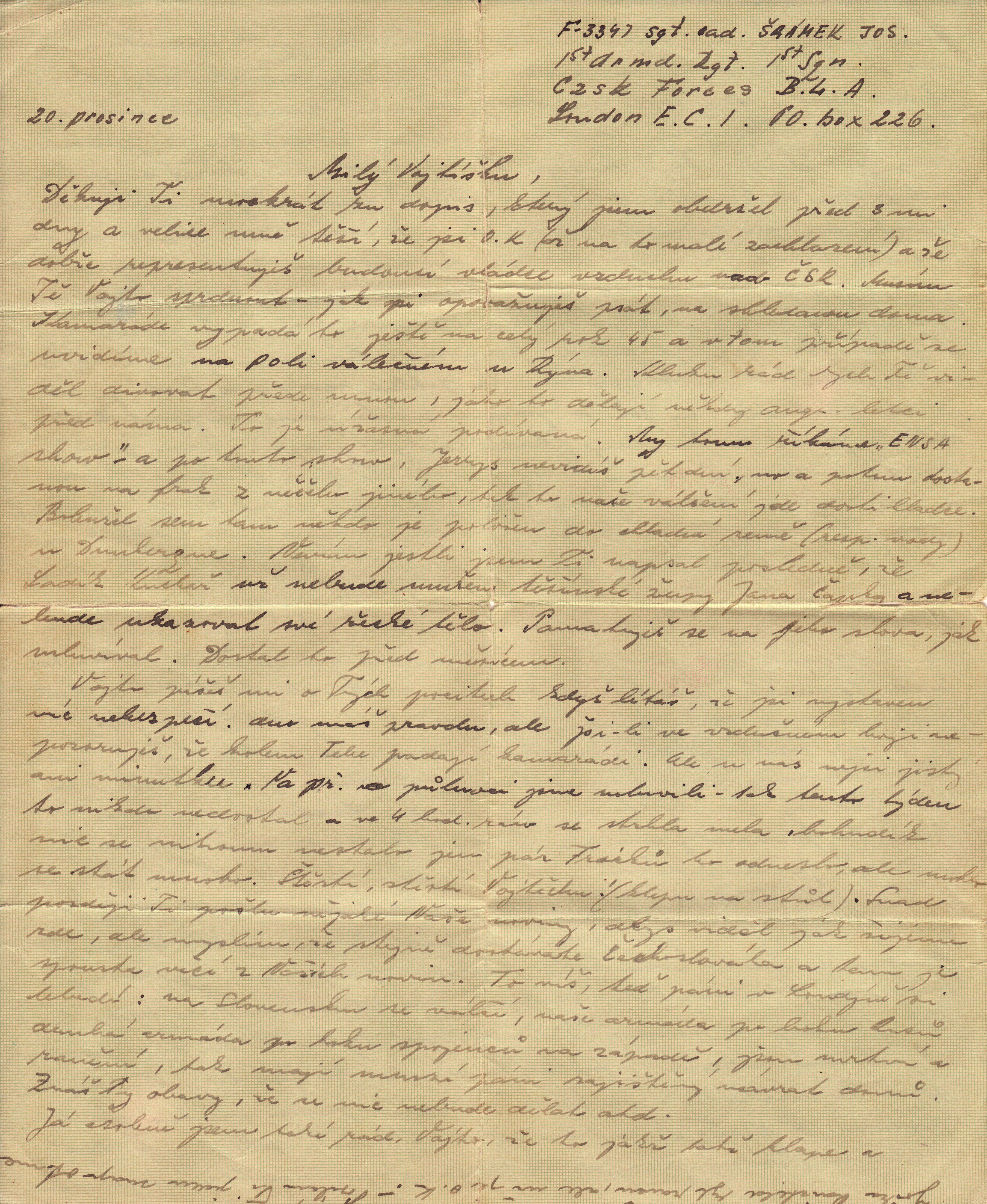 Poslední dopis Josefa Šrámka